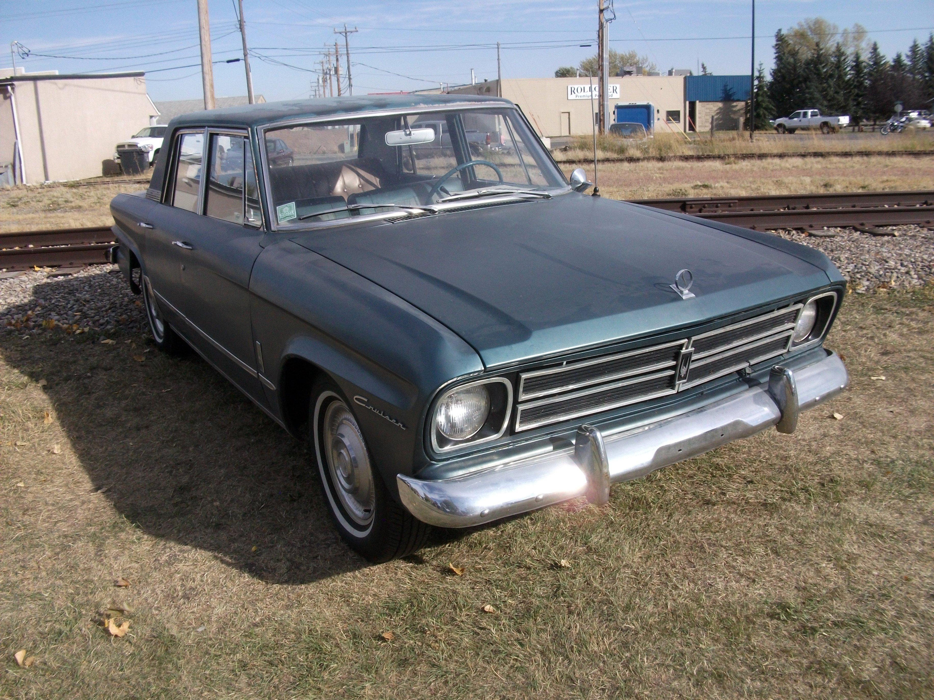 1966 Studebaker four door sedan